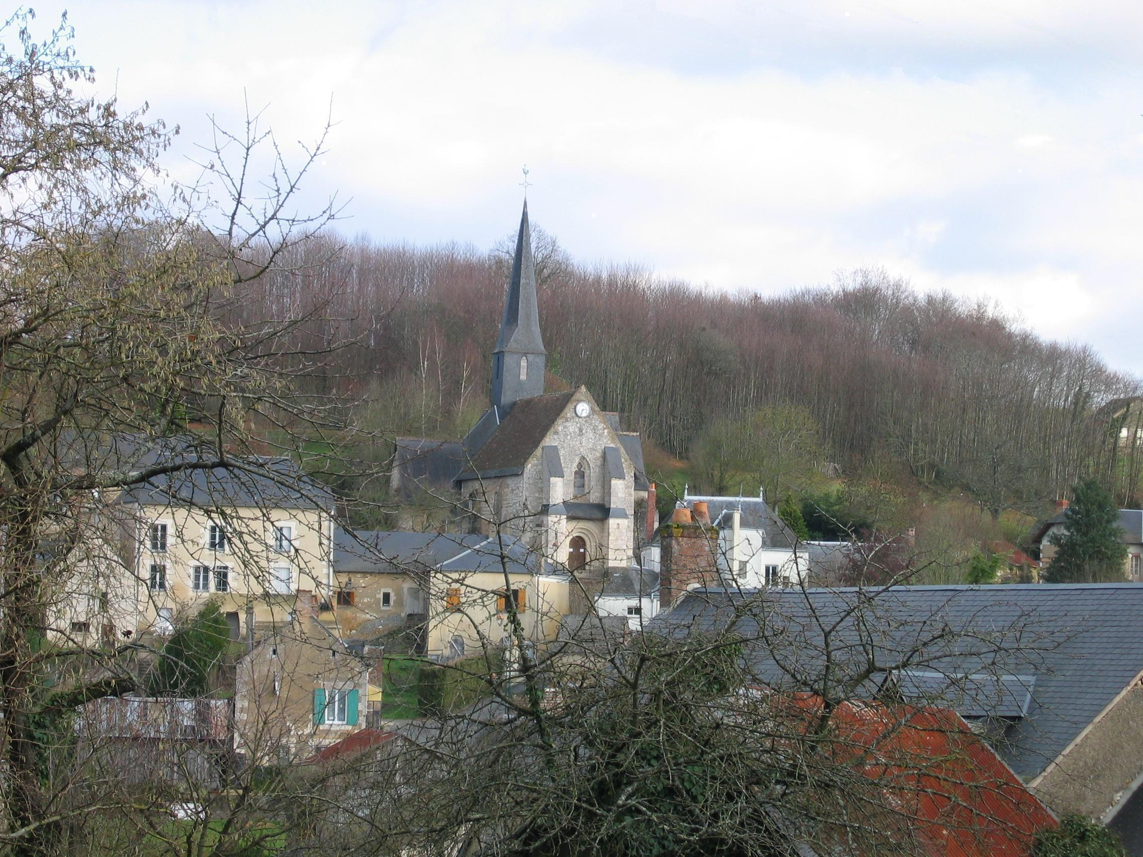 Cette photo à l'origine était encombrée de fils électriques. Je l'ai modifiée pour les retirer.